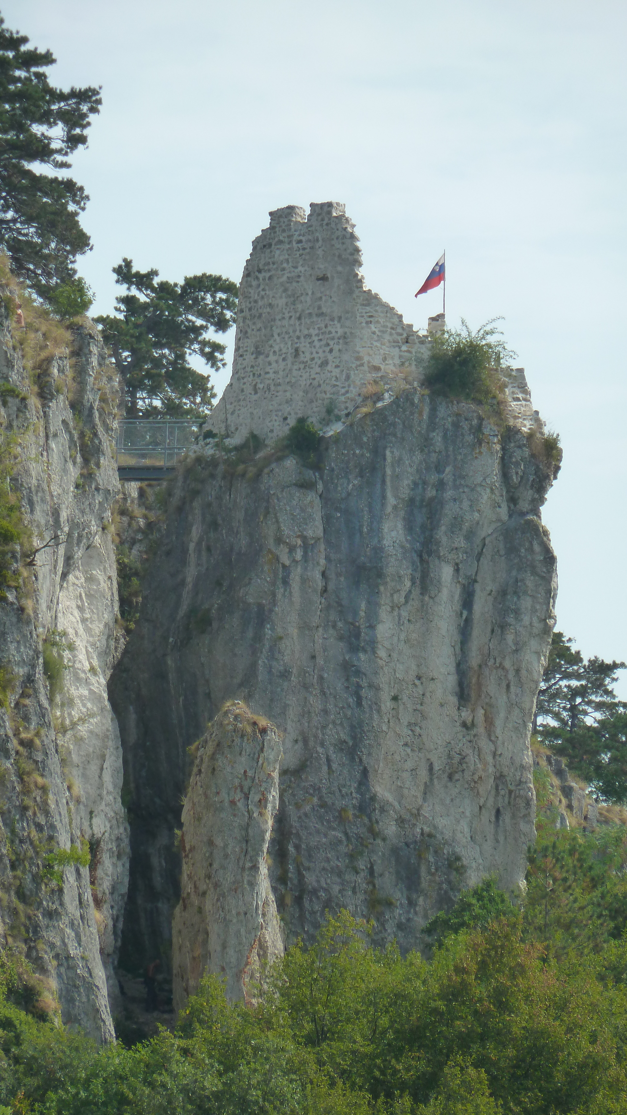 Crni Kal